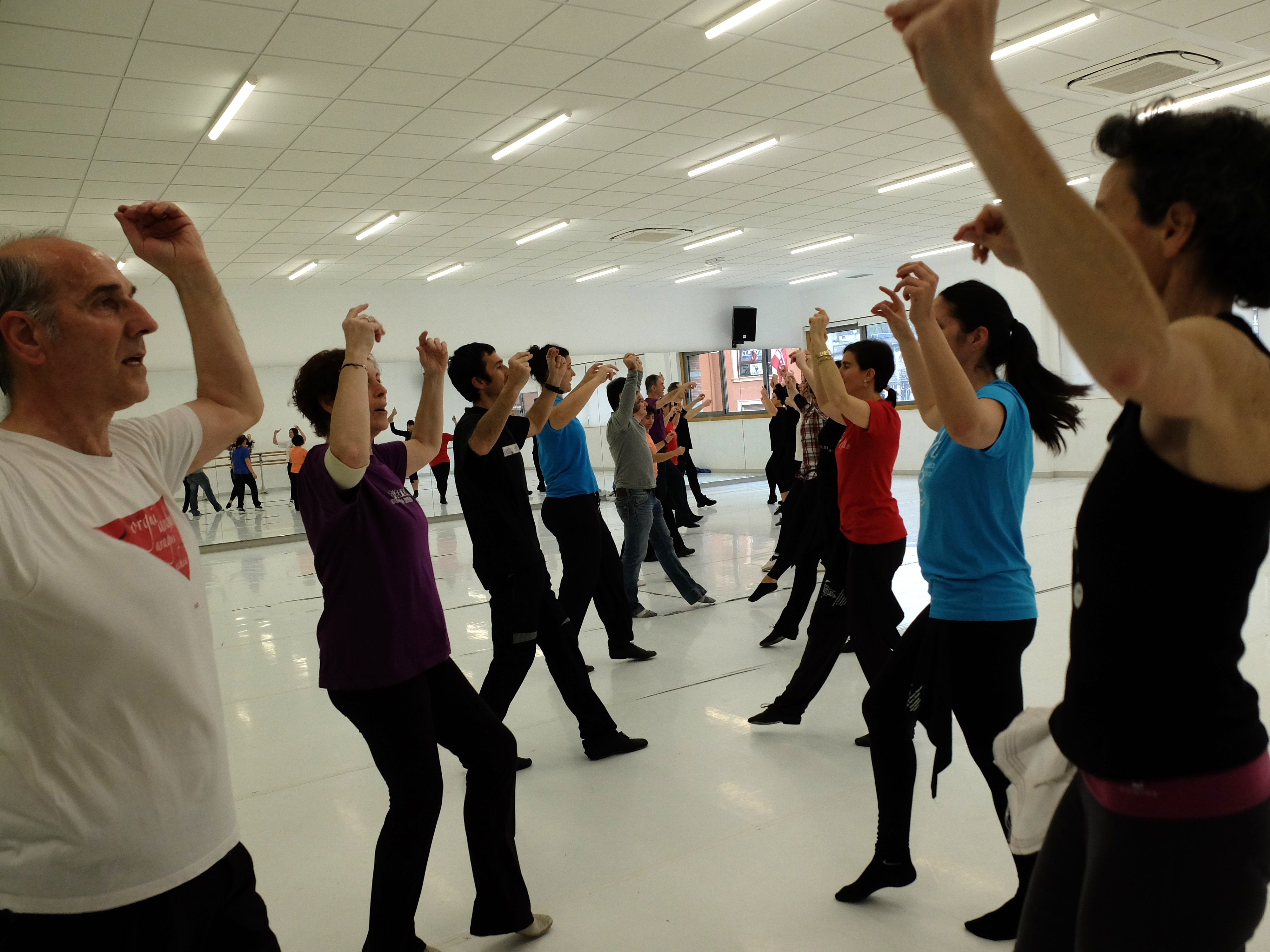 Dantzan Ikasi: larrain-dantza, Lizarrako ingurutxoa Argazkiak: Josu Garate 2016-04-16, Errenteriako Dantzagunea Lizarrako herri dantzen tailerra: Larrain dantza ikastaroa / Errenteriako dantzagunean, 2016ab